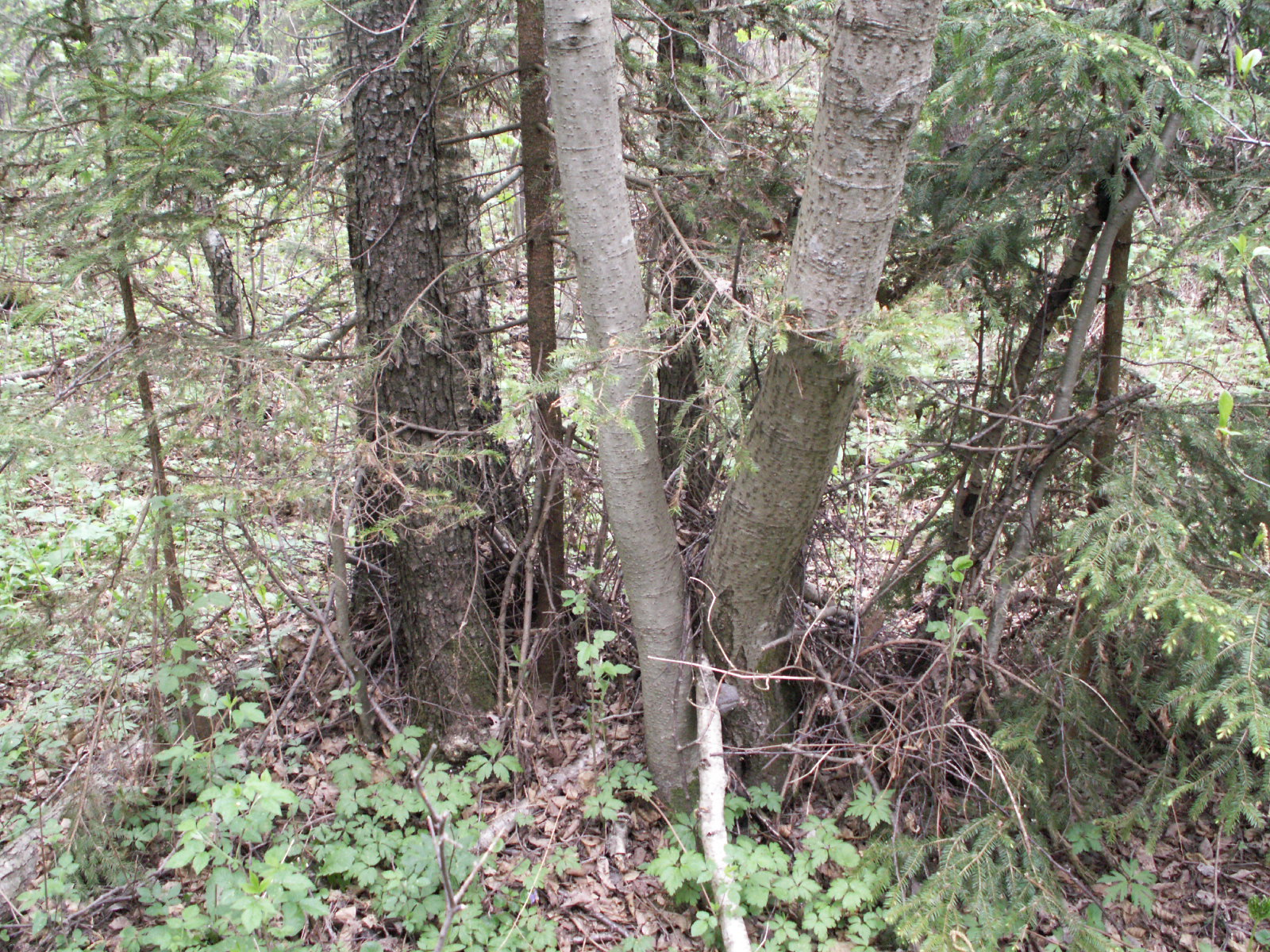 Stamm von Grau- und Schwarzerle Gray stem: Alnus incana Black stem: Alnus glutinosa